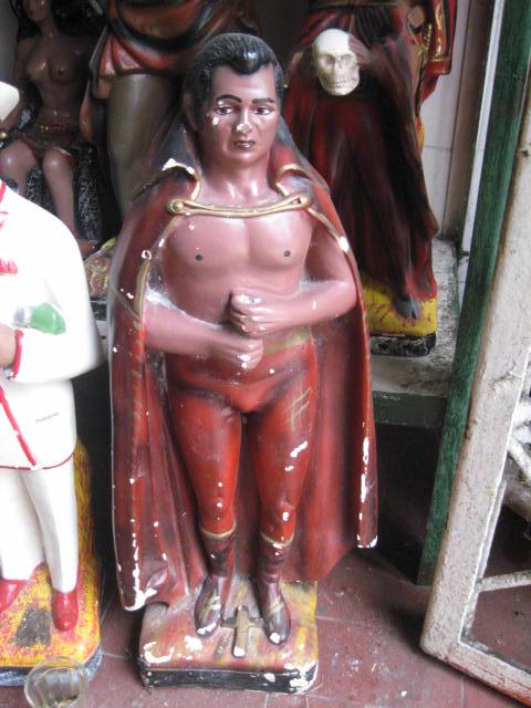 Exu Tranca-Ruas, entidade cultuada na Umbanda.